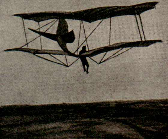 Lilienthal siklórepülőgépe